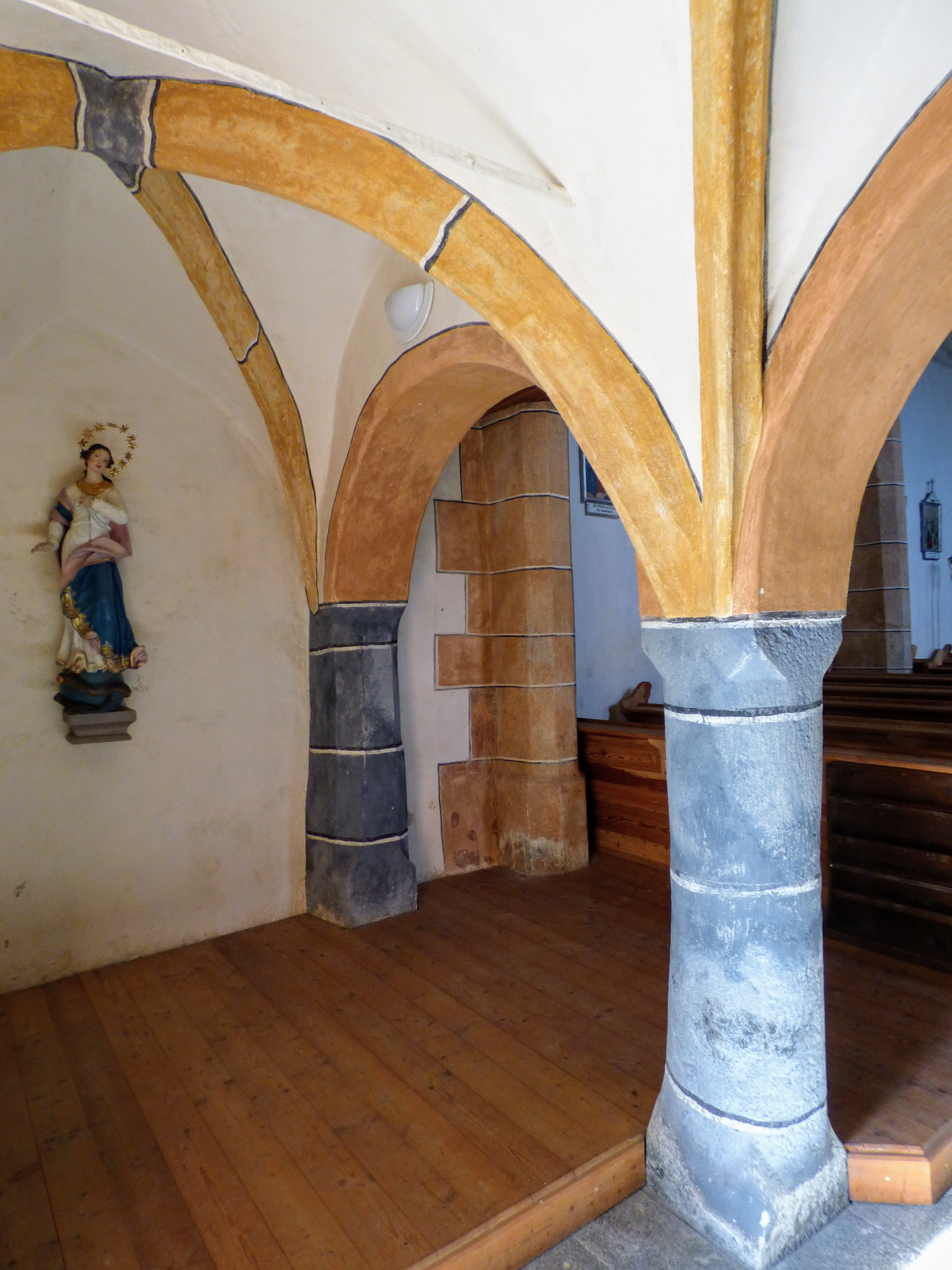 Inneres der Kath. Pfarrkirche hl. Martin, Greith (Gemeinde Neumarkt, Steiermark), unter der Empore